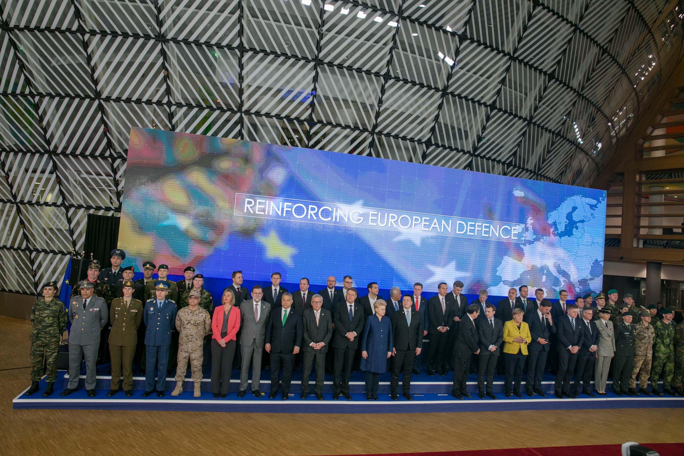 Photo: Tauno Tõhk (EU2017EE)